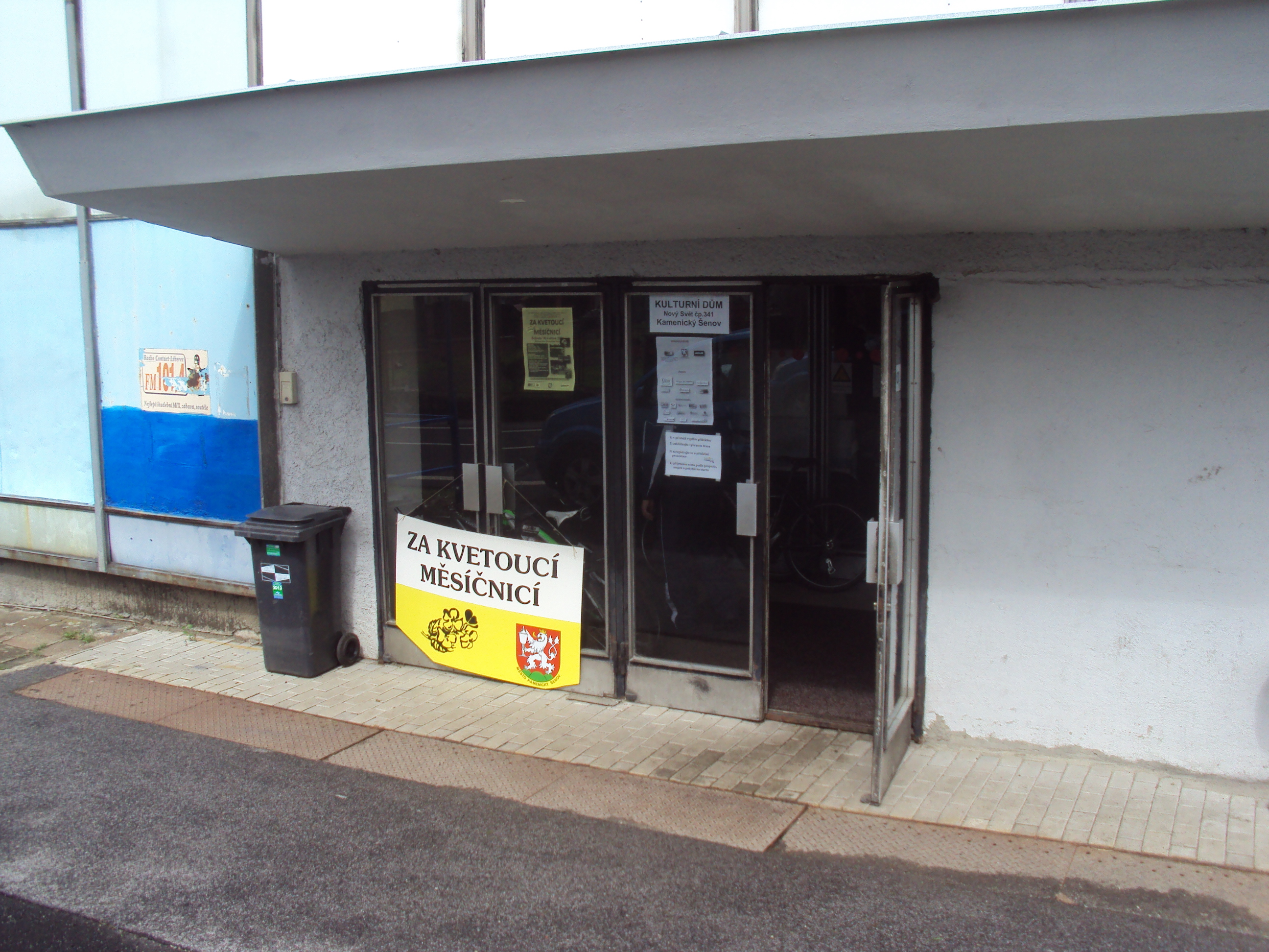 Start turistických pochodů v kulturním domě Kamenický Šenov